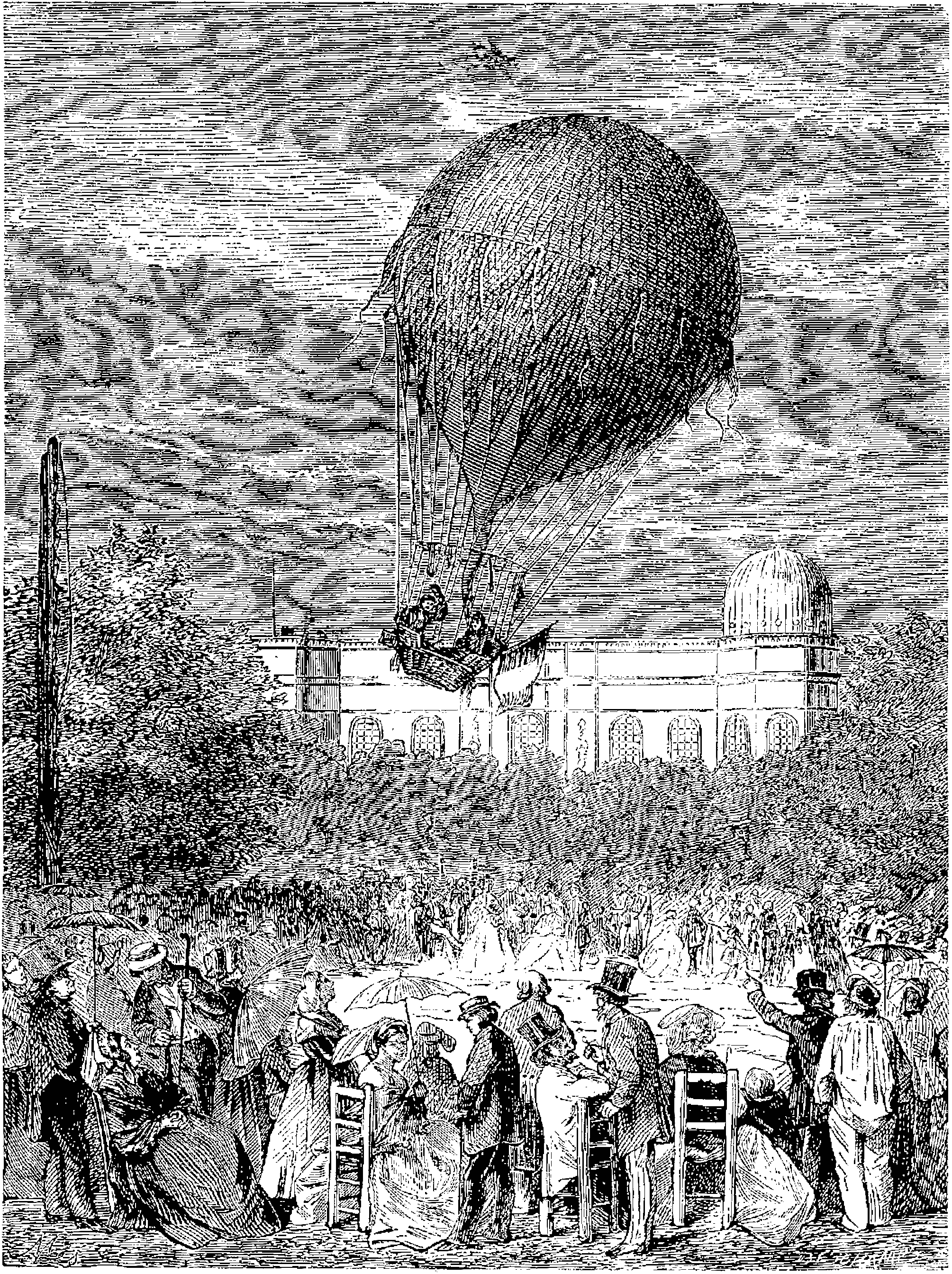 Ascension de MM. Barral et Bixio, départ de l’Observatoire le 27 juillet 1850